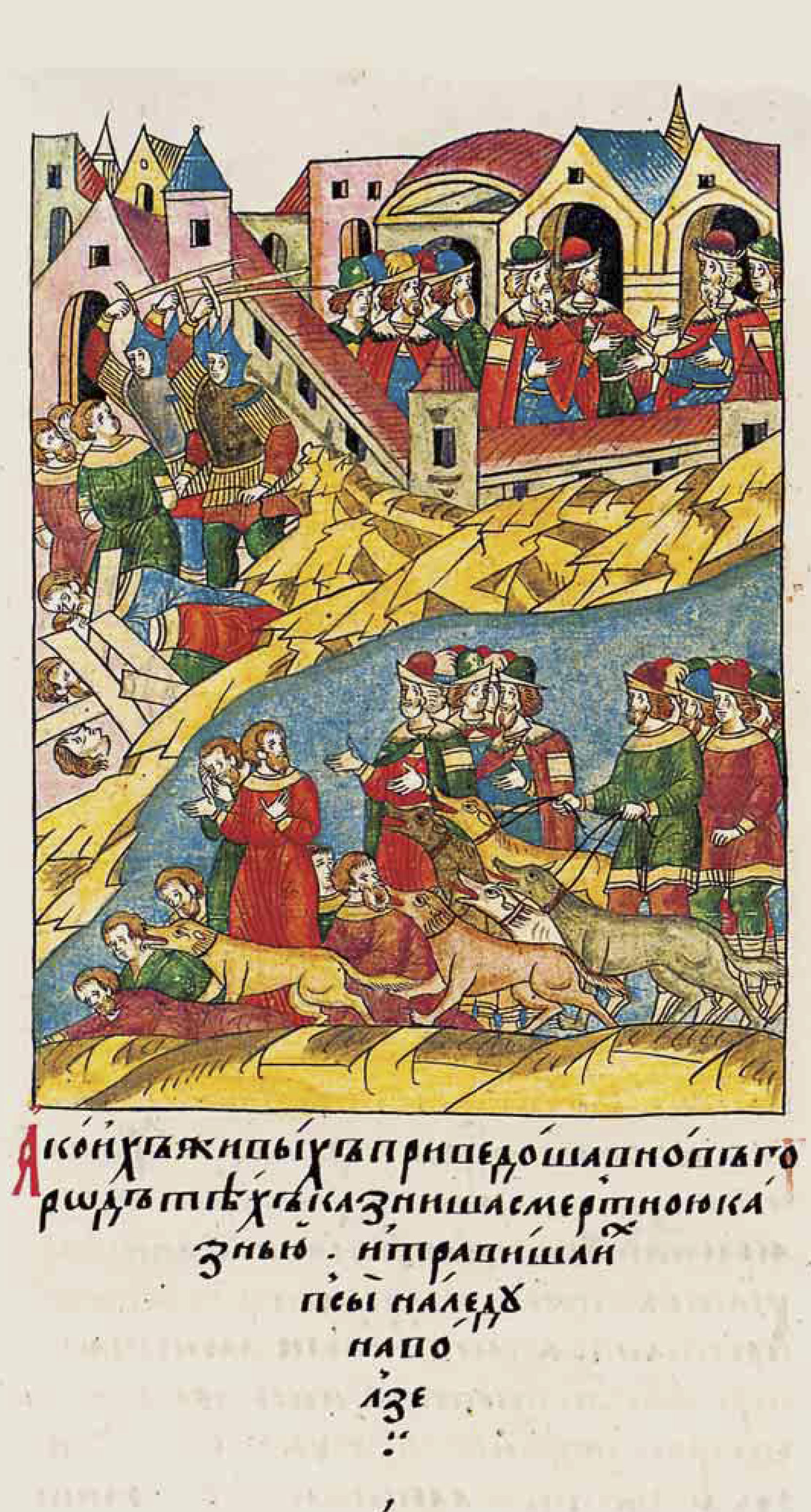 ЛИЦЕВОЙ ЛЕТОПИСНЫЙ СВОД [А великий князь Дмитрий Иванович Московский послал с ними свое войско и воеводу Феодора Андреевича Свибла. И начали воевать мордовскую землю, уезды, села, погосты и зимовья пограбили, людей убили, женщин их и детей захватили в плен, всю землю их пусту сотворили.] А тех, кого живыми привели в Новгород, тех казнили, травили их псами на льду Волги.